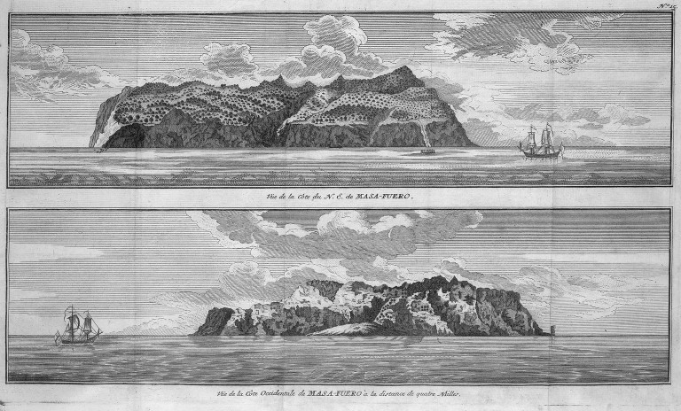 [Illustrations de Voyage autour du monde] Auteur : George Anson Éditeur : Henri-Albert Gosse et Compagnie (Genève) 1750